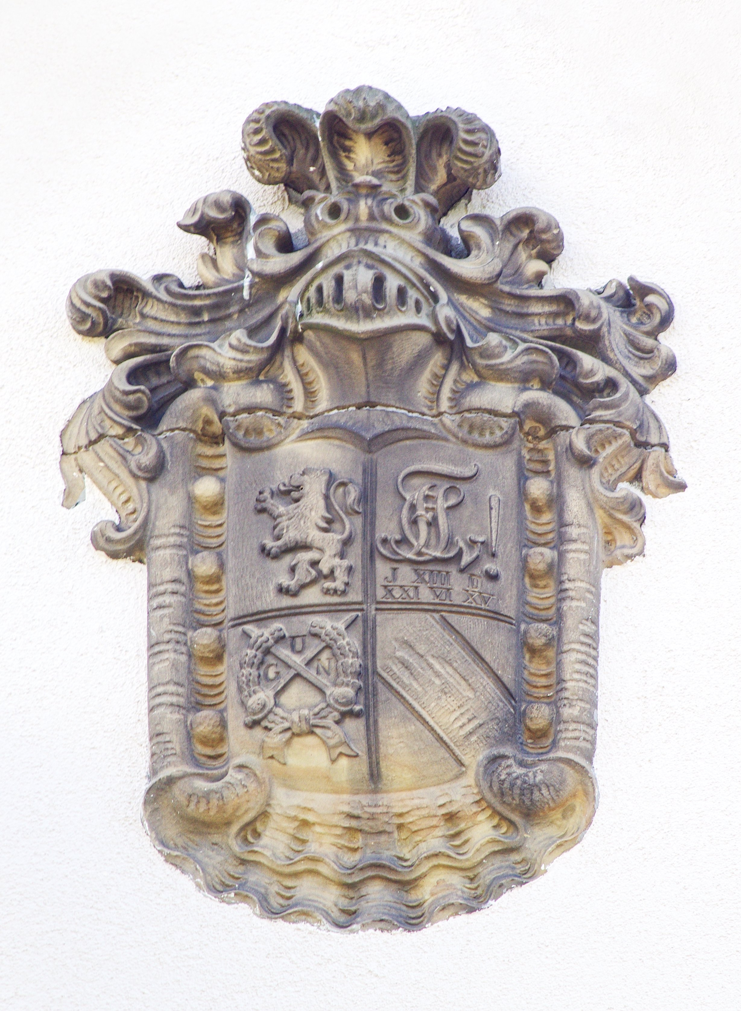 Die ehemalige Oberpostdirektion in der Lessingstr. 14 jetzt Verbindungshaus des Corps Suevia Freiburg im KSCV